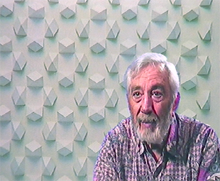 Portrait de Luis Tomasello